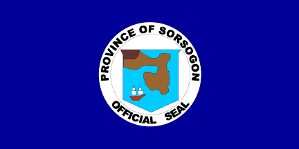 Dit materiaal is afkomstig van of en is door de auteur Jaume Ollé als GFDL beschikbaar gesteld, zie de toestemmingsemail. Hiermee vervallen de strictere voorwaarden in de disclaimers op de genoemde sites.Vrijgegeven bijdrage op Flags of the World van Jaume Olle. Zie deze verklaring op de Spaanstalige Wikipedia. GNU FDL